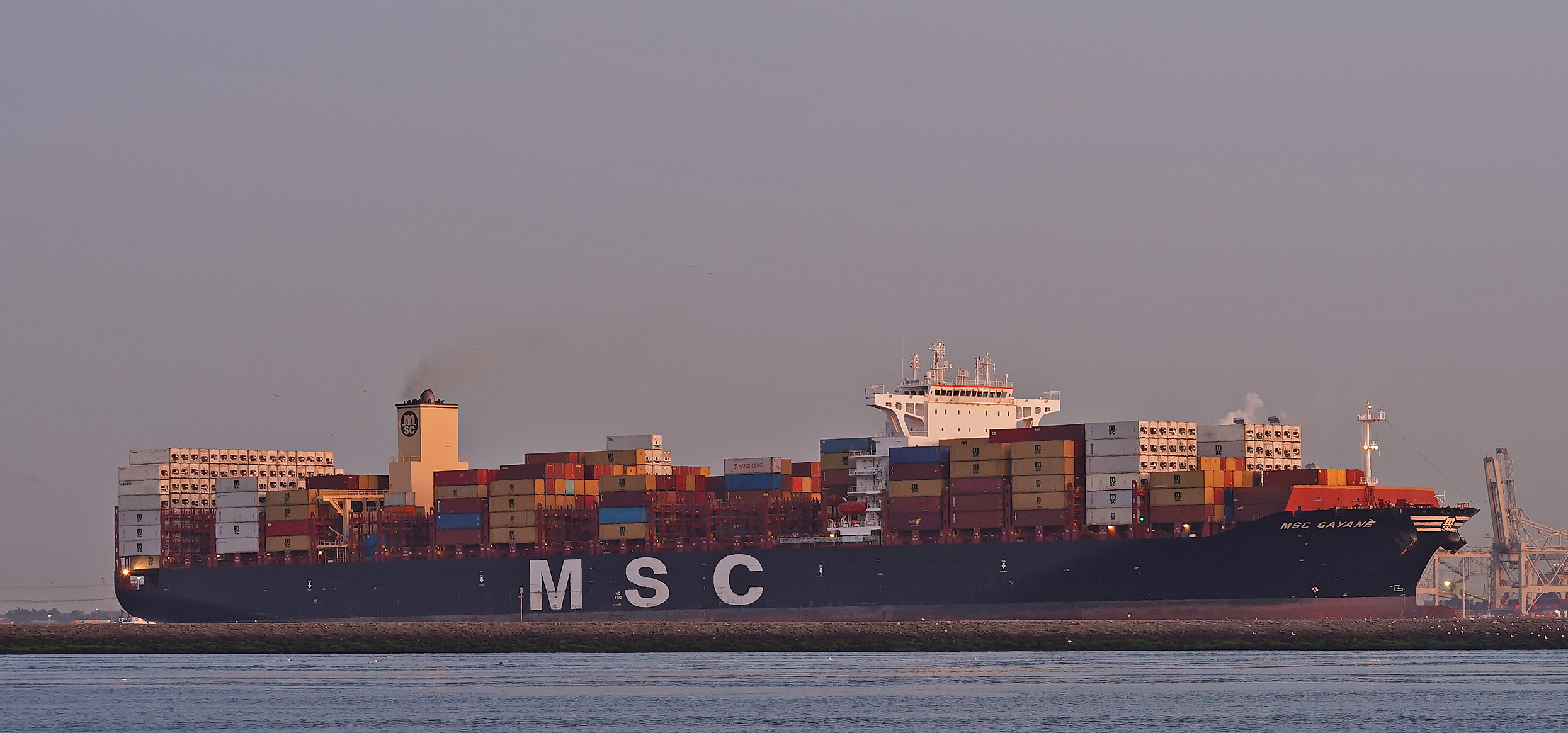 Hoek van Holland 23-7-2019